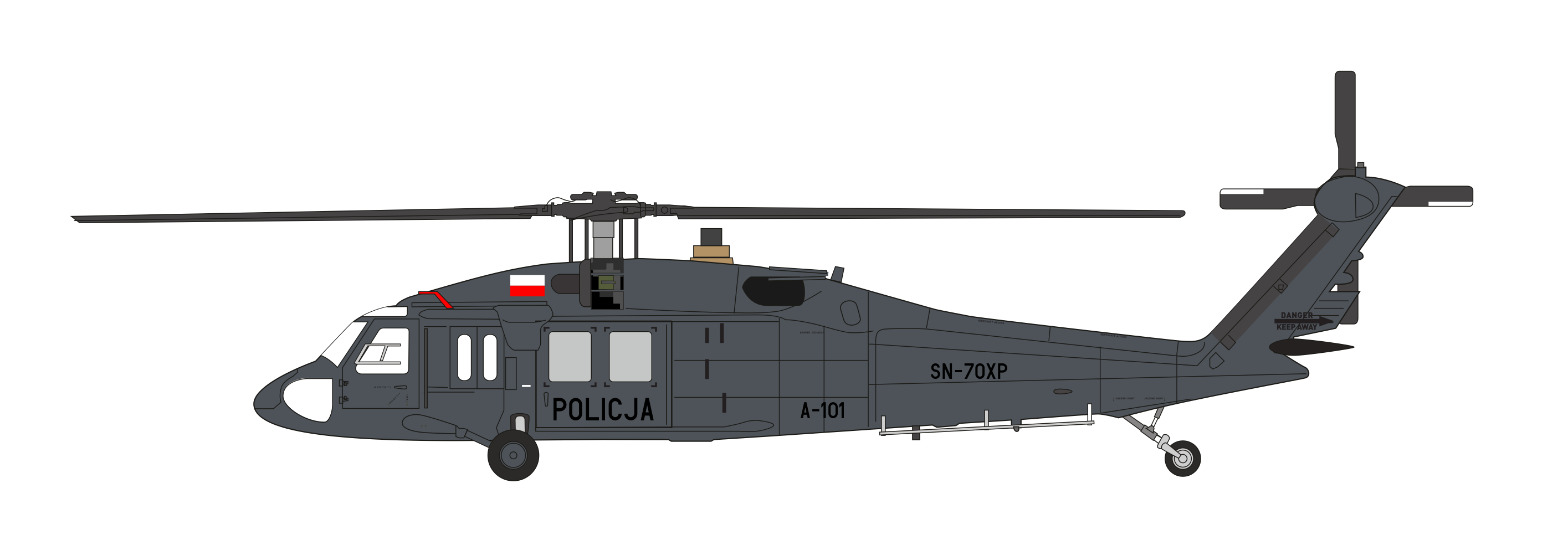 S-70i Blackhawk Policji